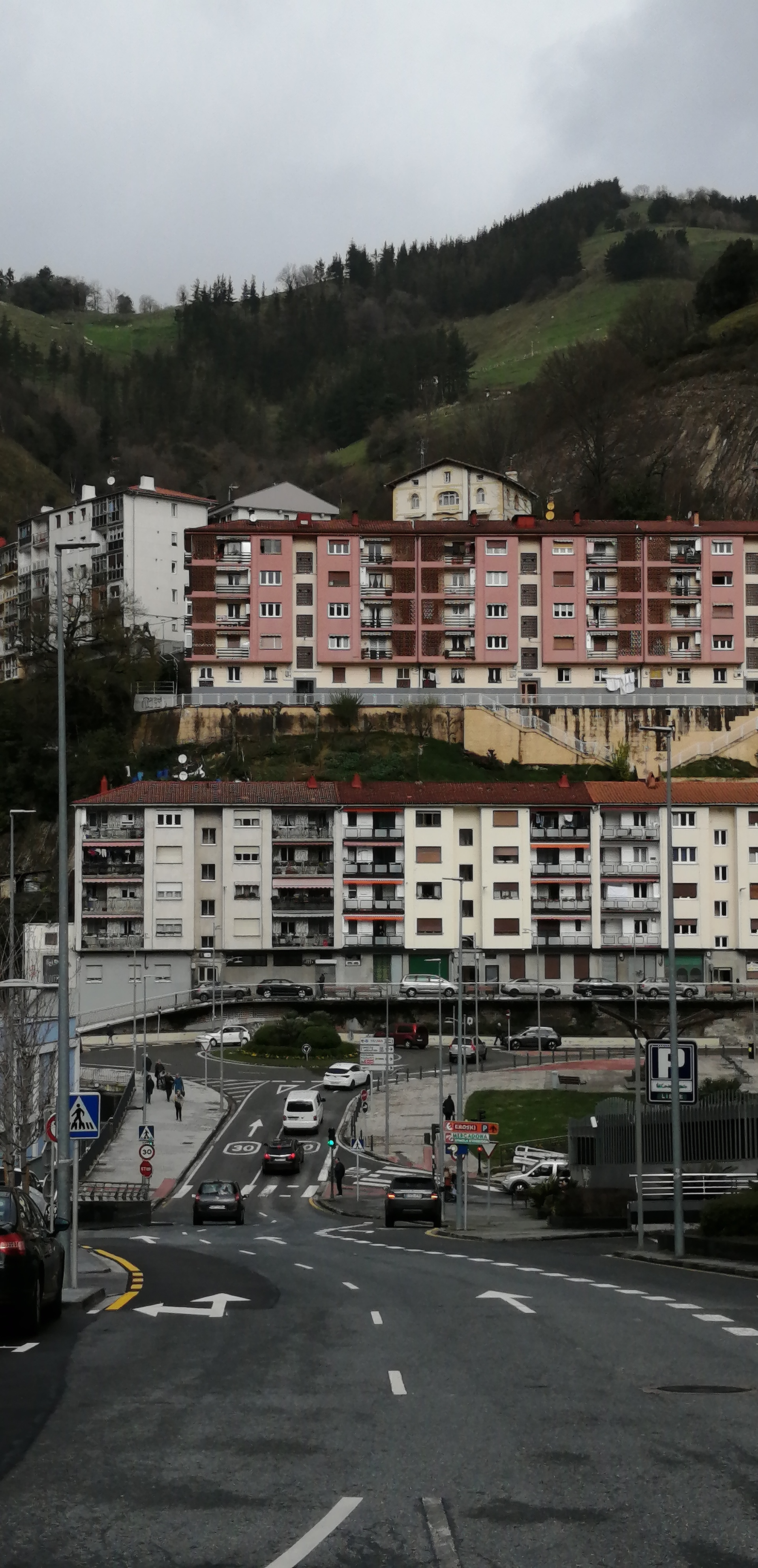 Eibarko etxeak mendi magaletan, aldapan